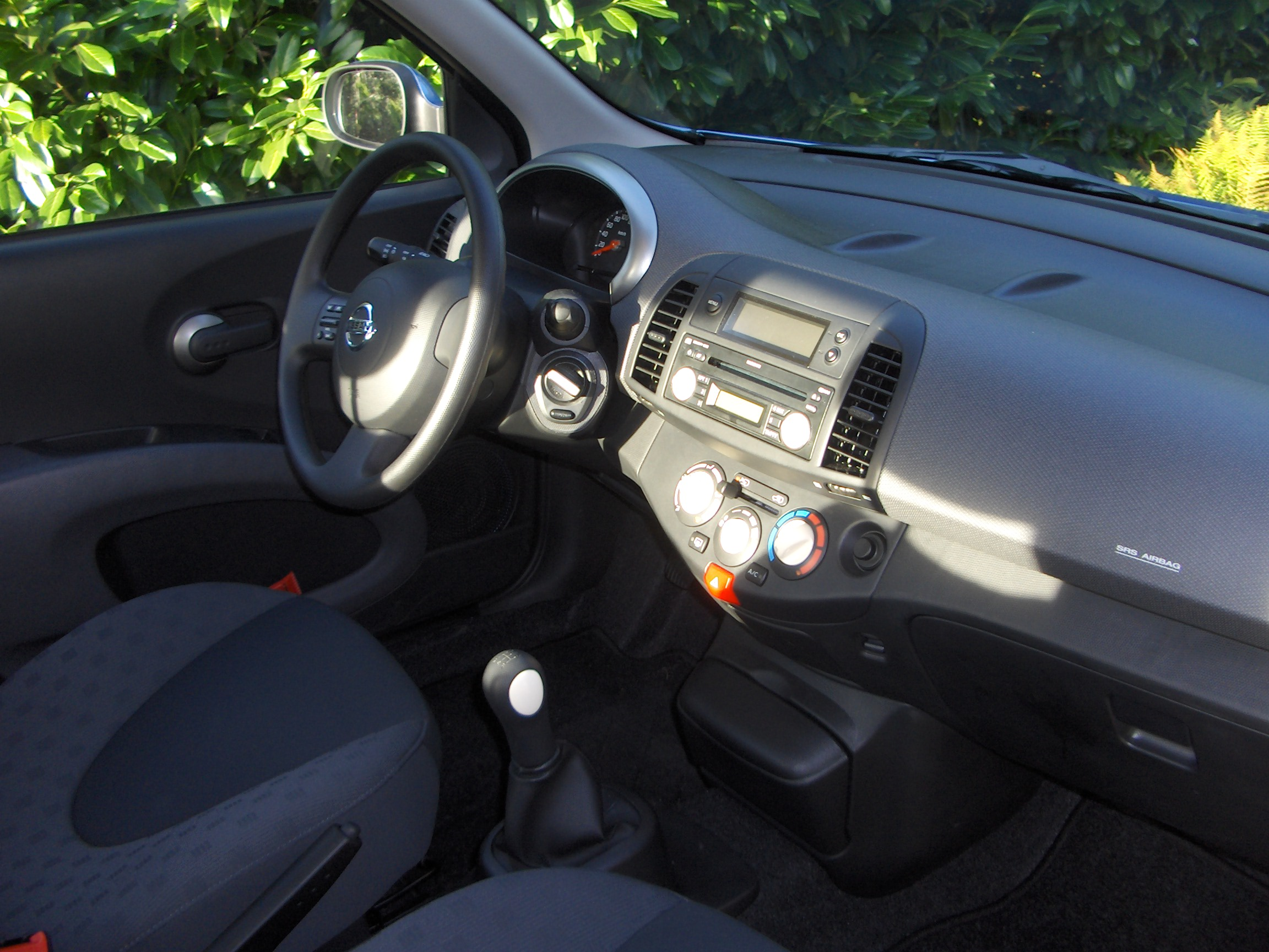 Interieur Micra derde generatie